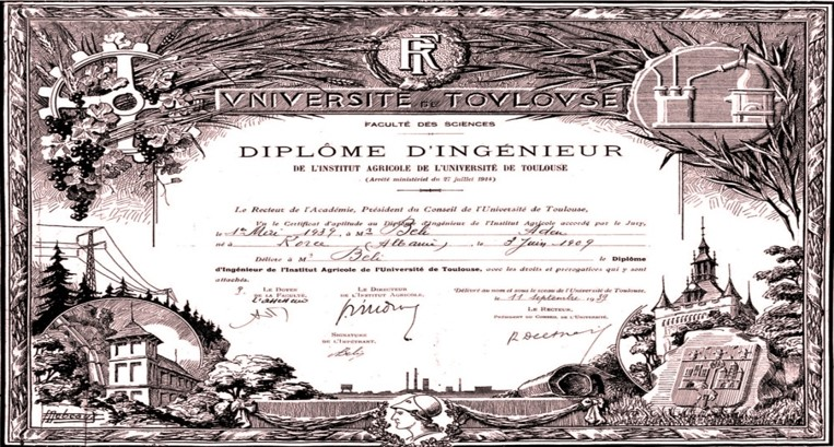 Diploma-Liceu Francez